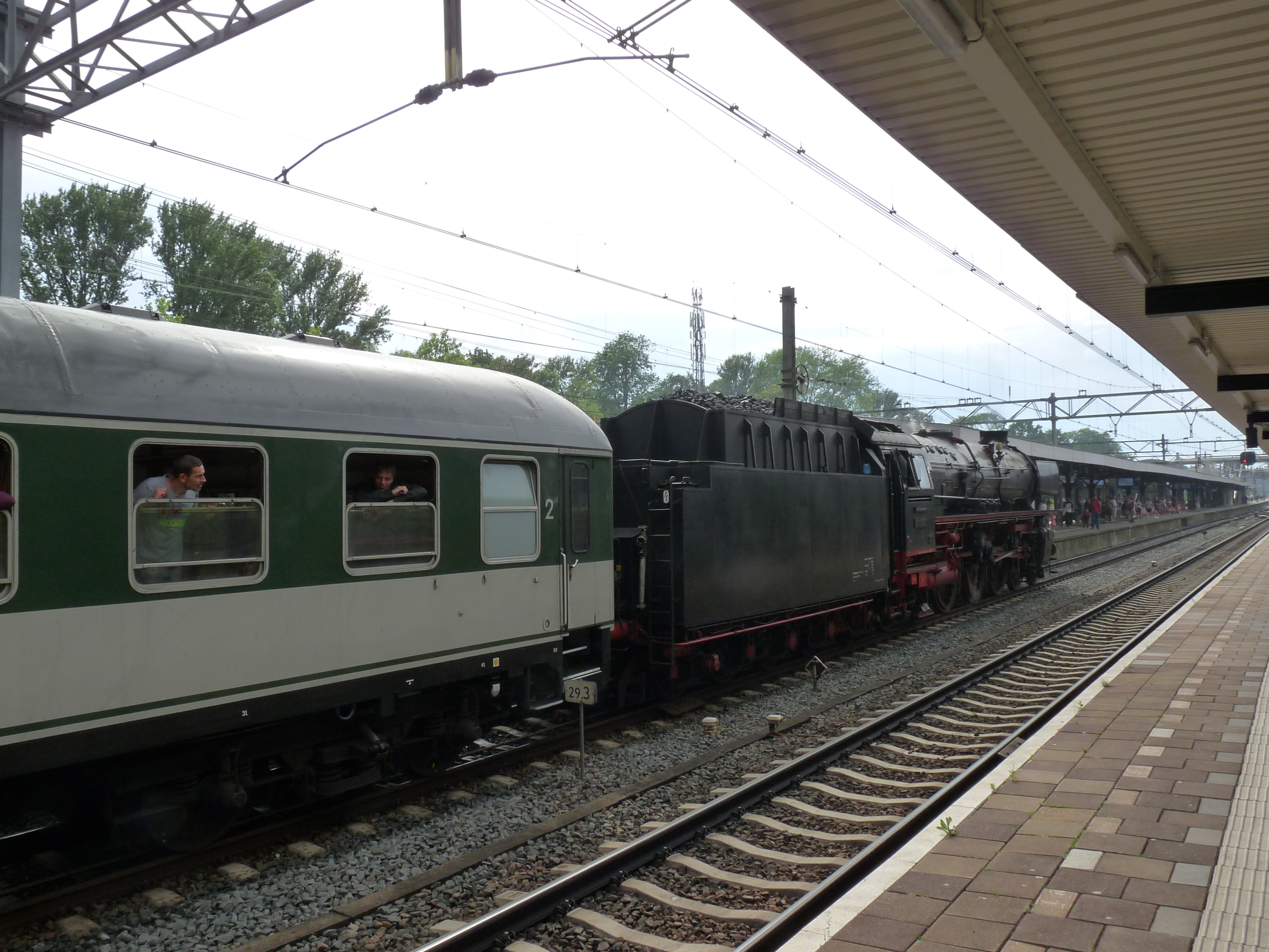 Stoomtrein bij Dordt in Stoom